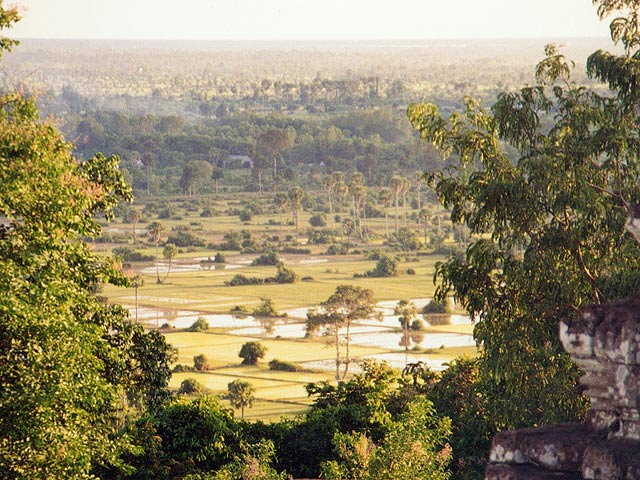 Reisfelder im Gebiet von Angkor (Provinz Siem Reap, Kambodscha), gesehen vom Phnom Bakheng.